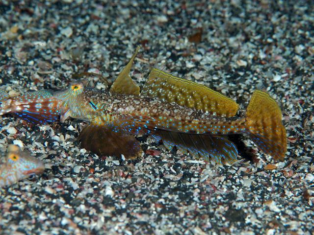 コブヌメリ Diplogrammus xenicus